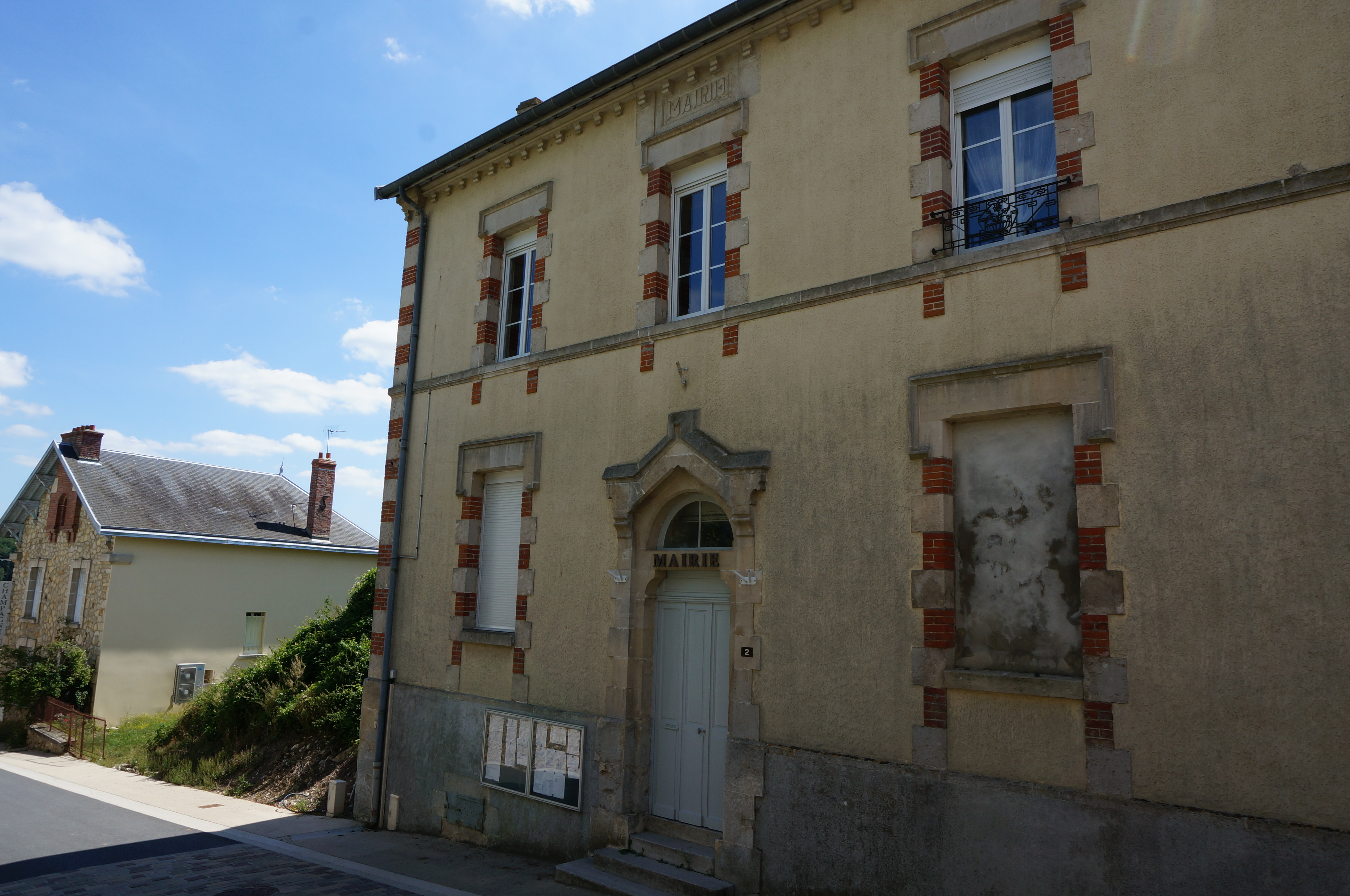 Vue de .